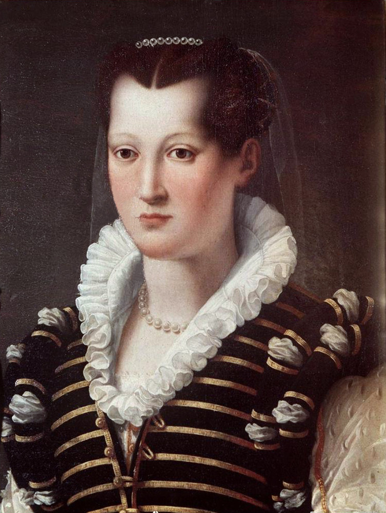 Porträt Isabella de' Medicis